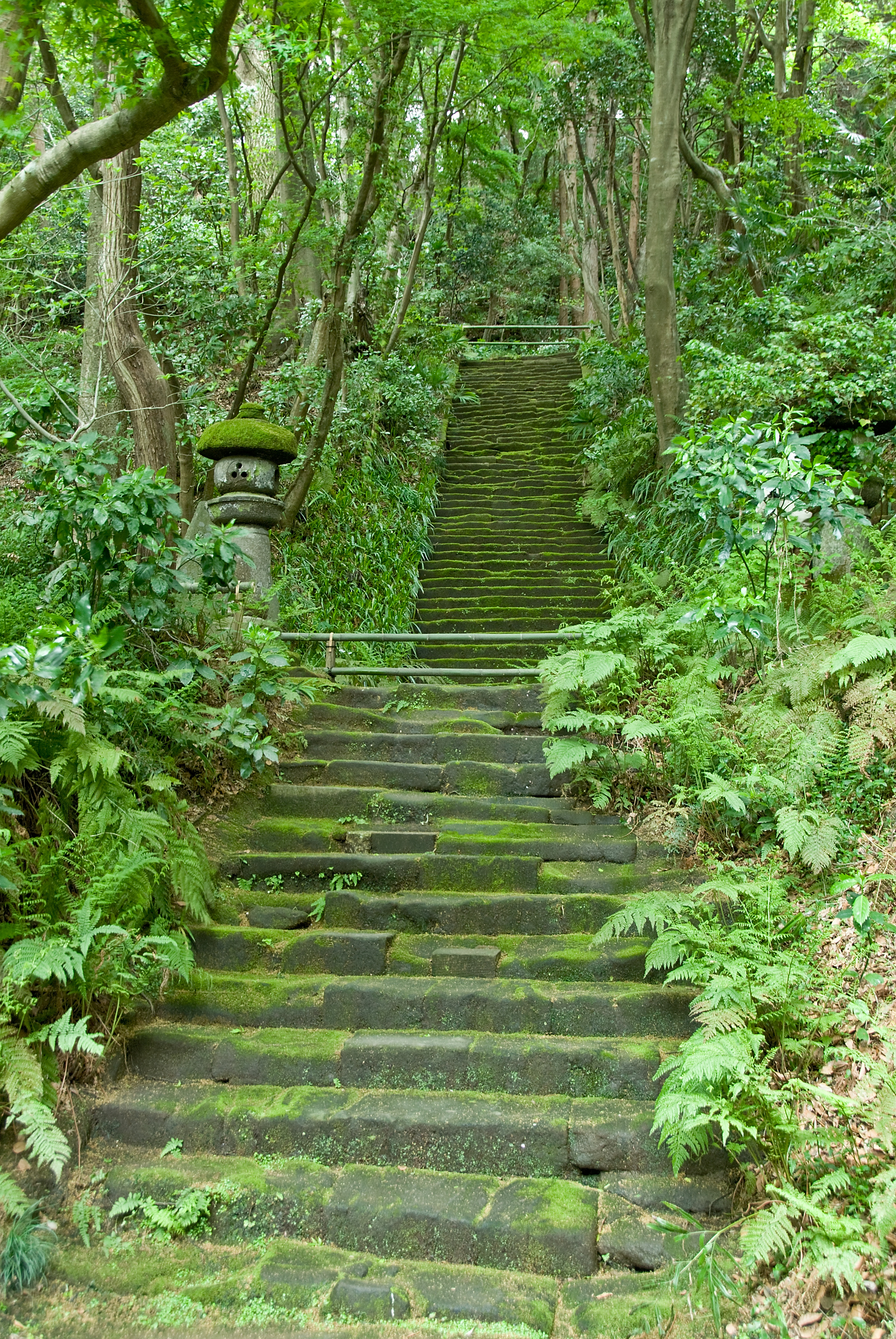 the famous moss at Myōhō-ji, Kamakura